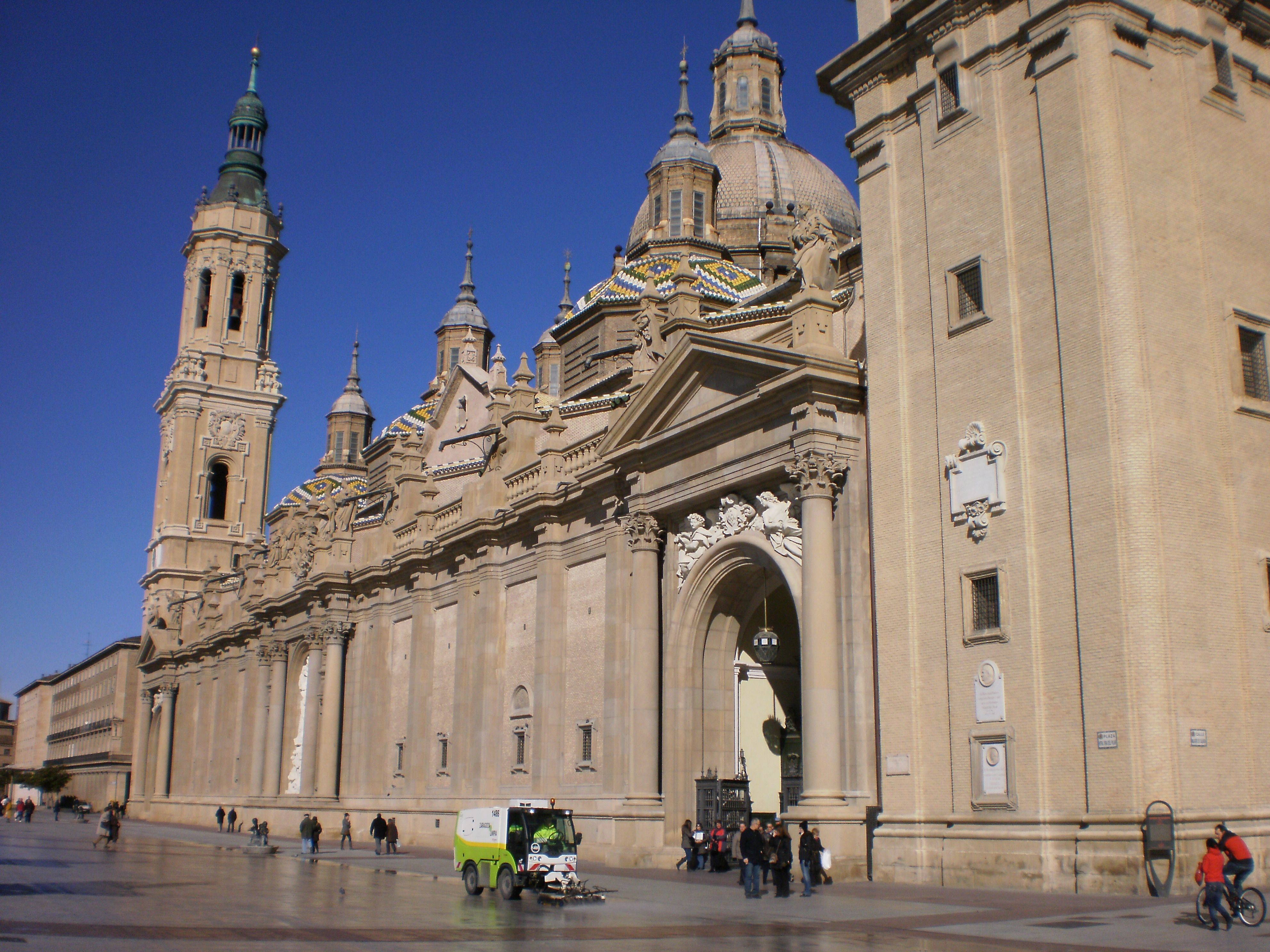 Basílica de Nuestra Señora del Pilar de Zaragoza